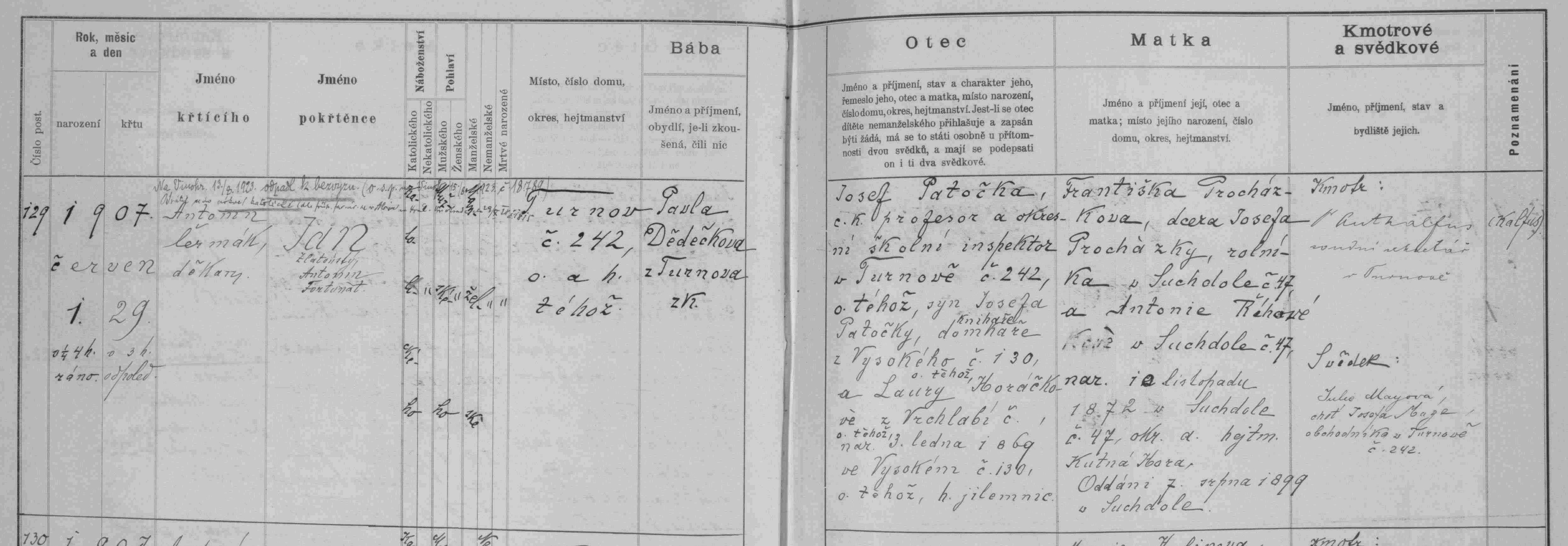 matriční zápis o narození a křtu Jana Patočky (matrika N index N 1906-1914 Turnov (SOA Zámrsk))